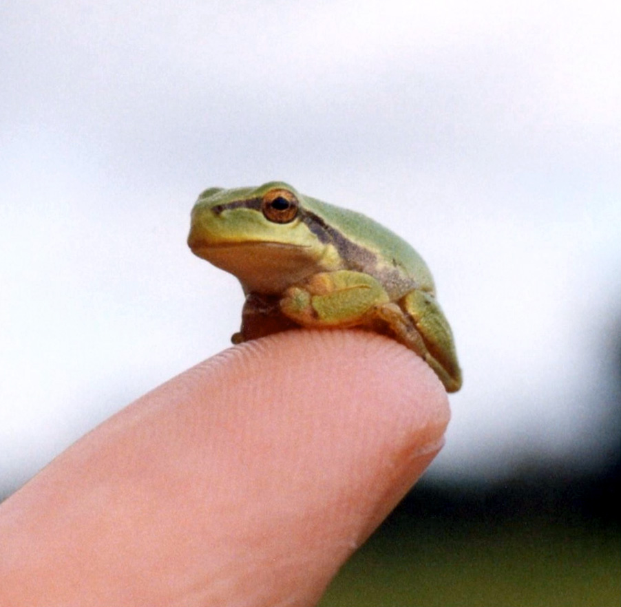 Frisch metamorphosiertes Laubfrosch-Jungtier (Hyla arborea) auf Daumenkuppe; Nordost-Niedersachsen (Deutschland). Typische Ruhehaltung von Laubfröschen mit an den Körper angelegten Fingern und Zehen.